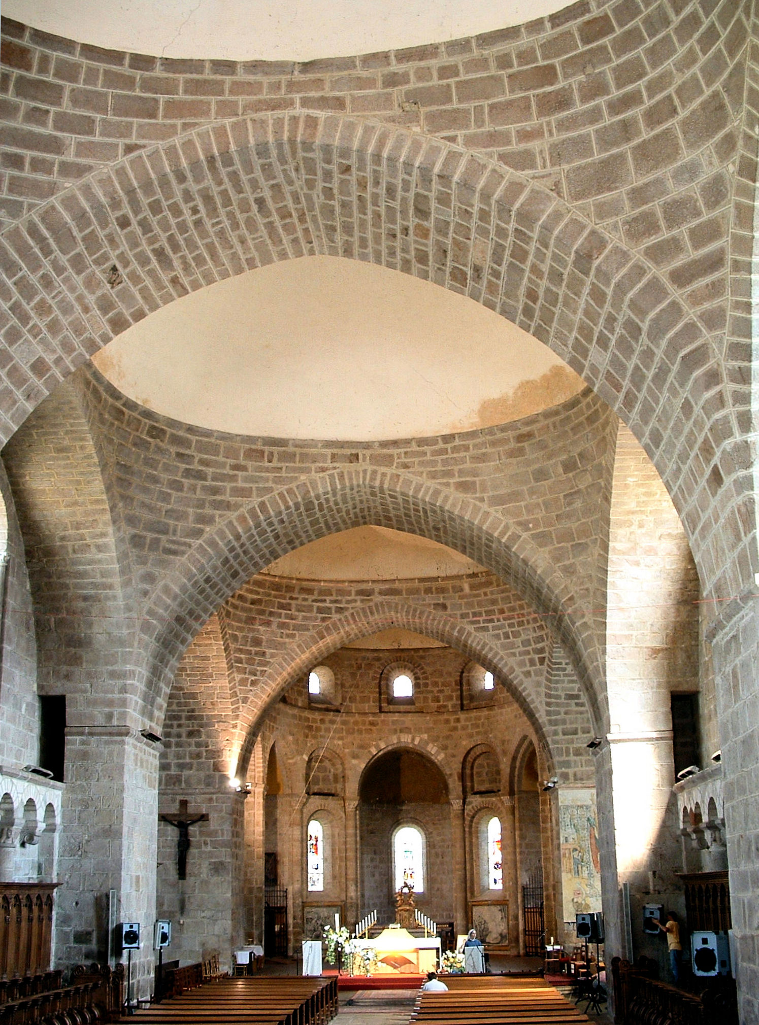 Solignac - Abbatiale Saint-Pierre - Nef